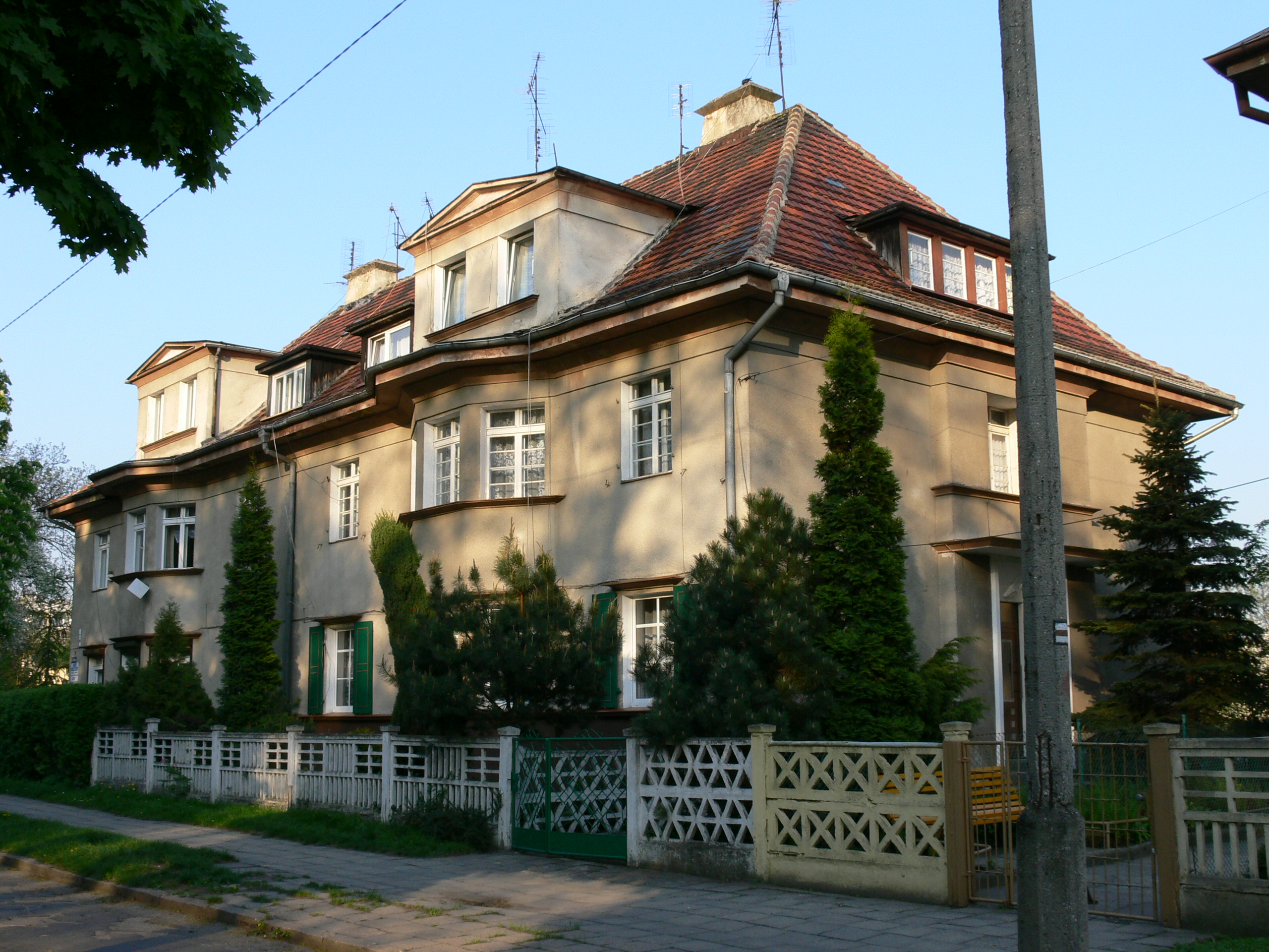 Racibórz — willa bliźniacza przy ul. Bema 10/12